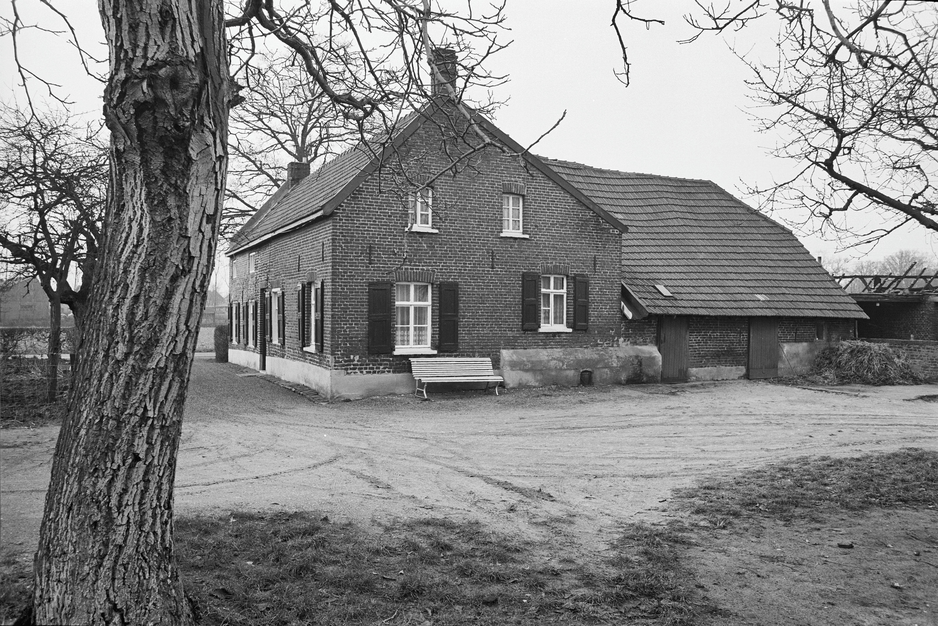 Risselt/Vullings: rechter zijgevel